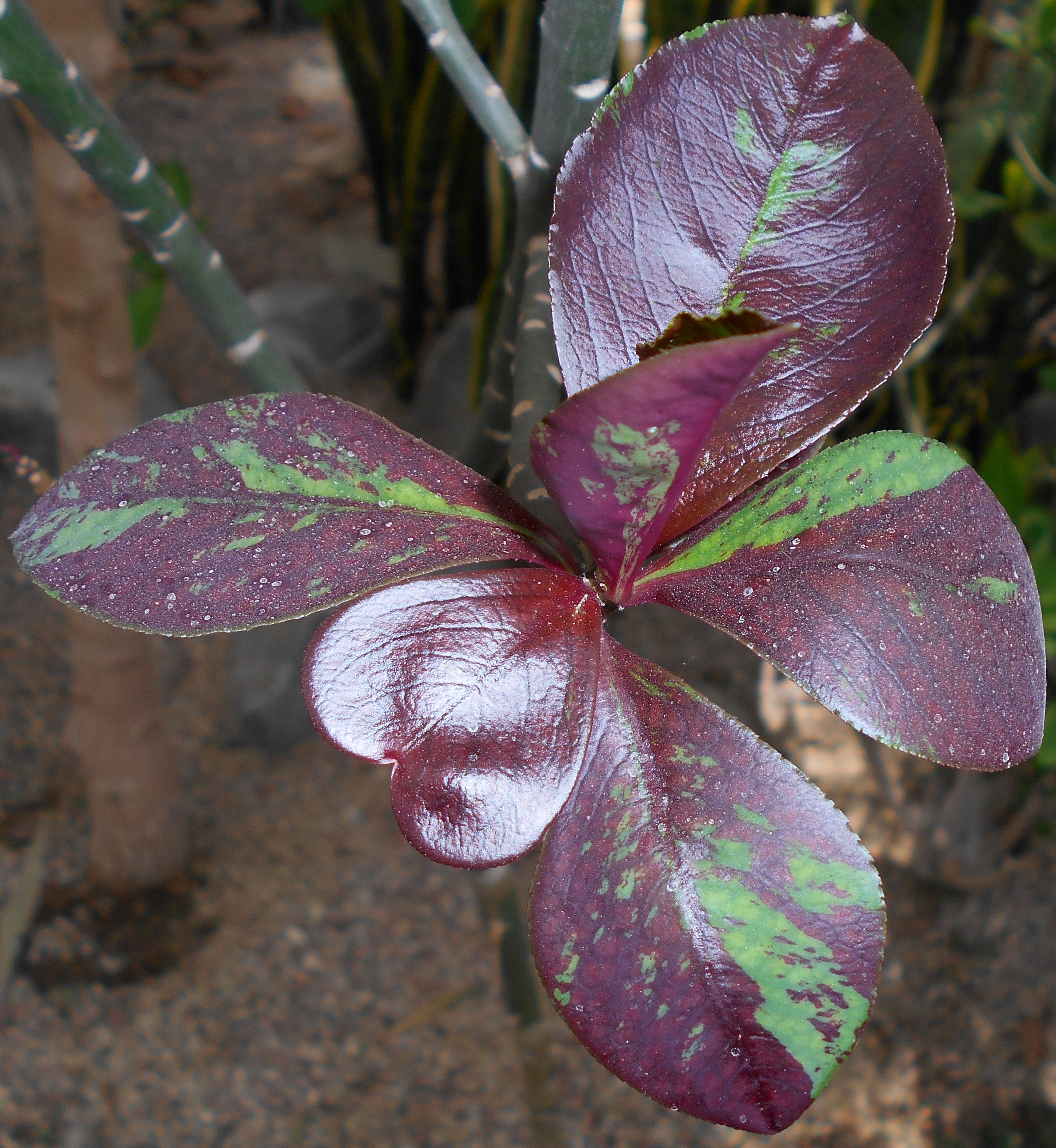 Synadenium grantii (Euphorbia grantii?), Ogród Botaniczny UMCS, Lublin, Polska.